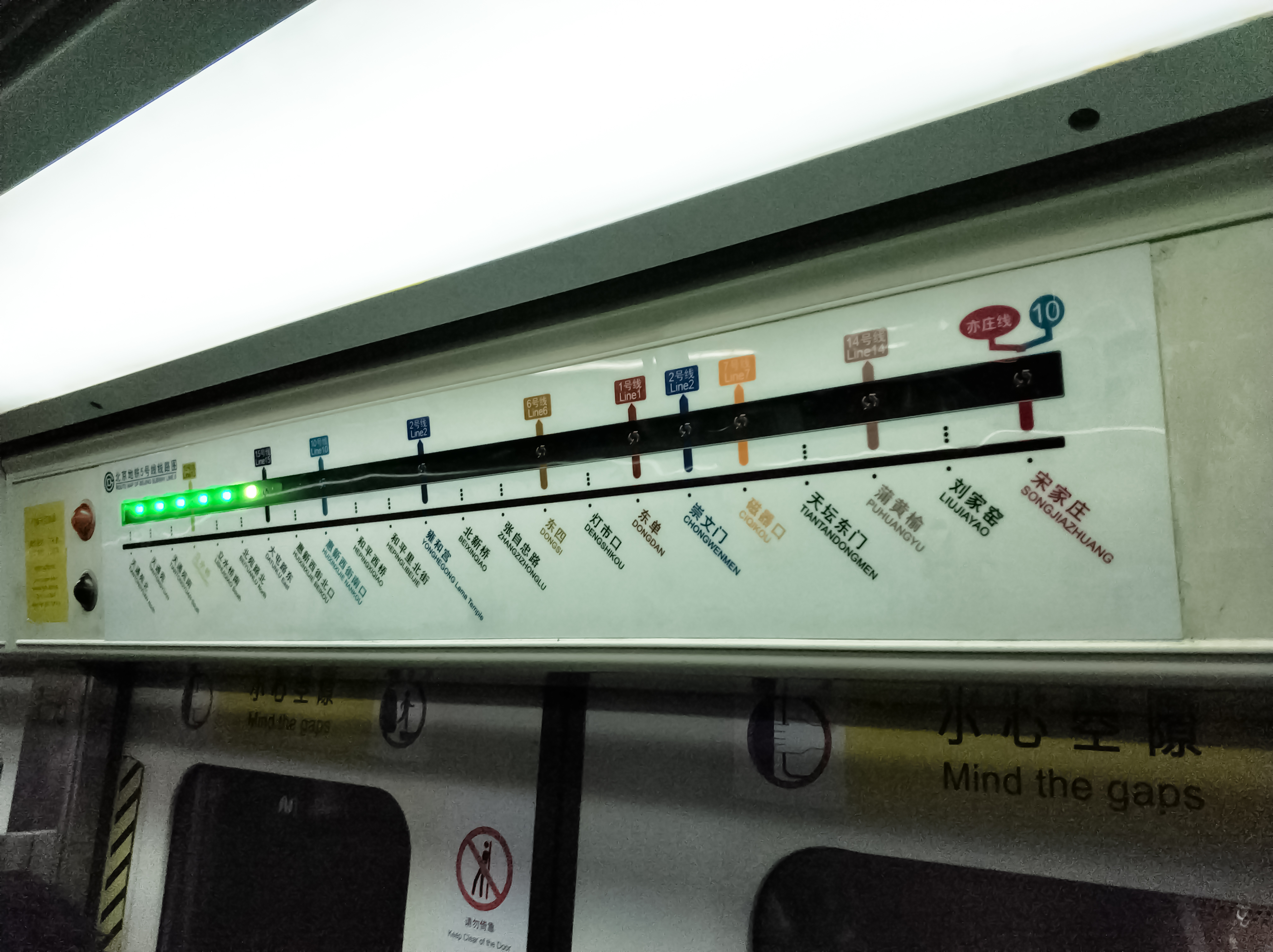 中文（中国大陆）: DKZ13车门上方的闪灯图。